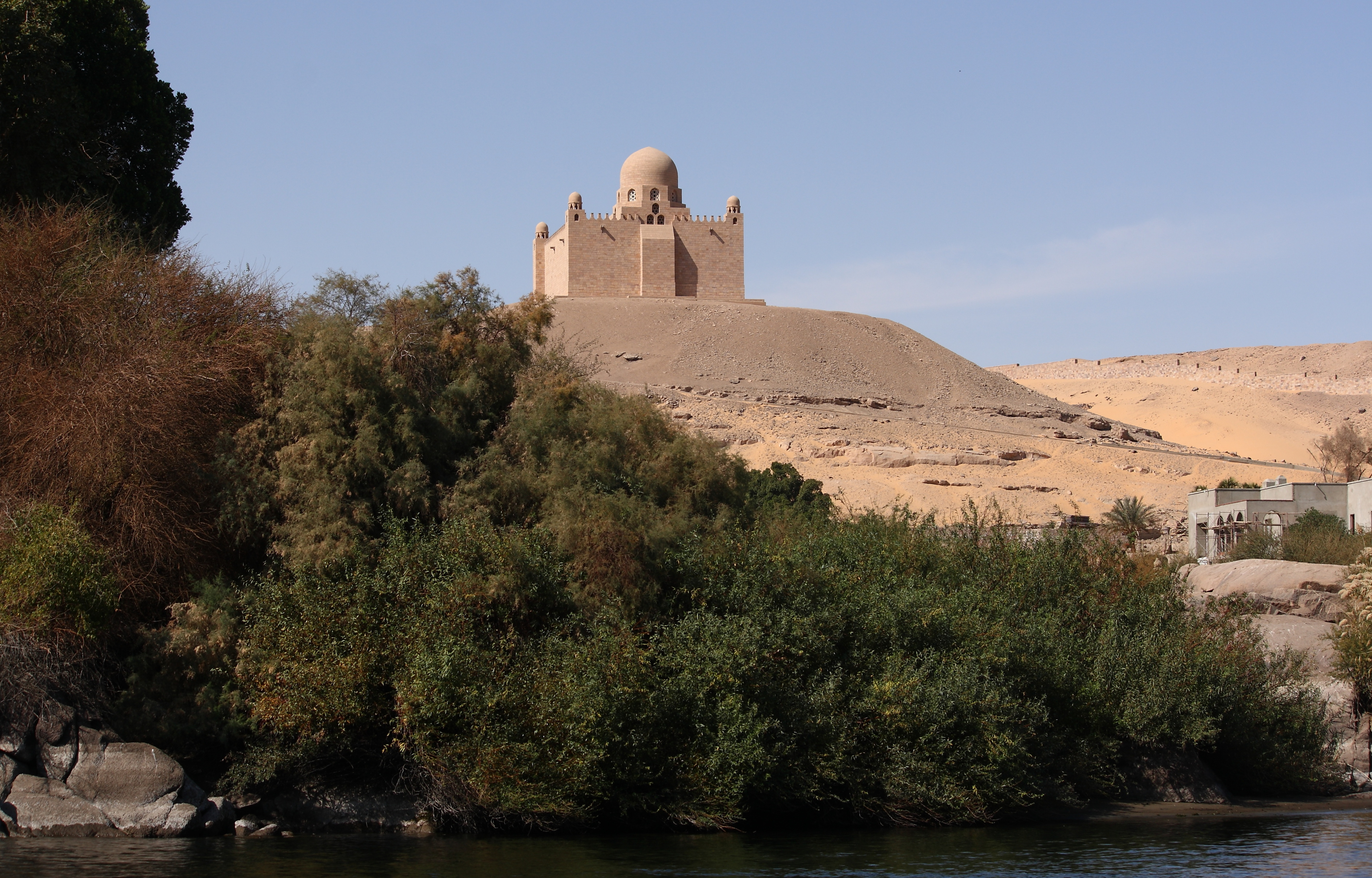 Bei Assuan, linkes Nilufer, Aga Khan Mausoleum